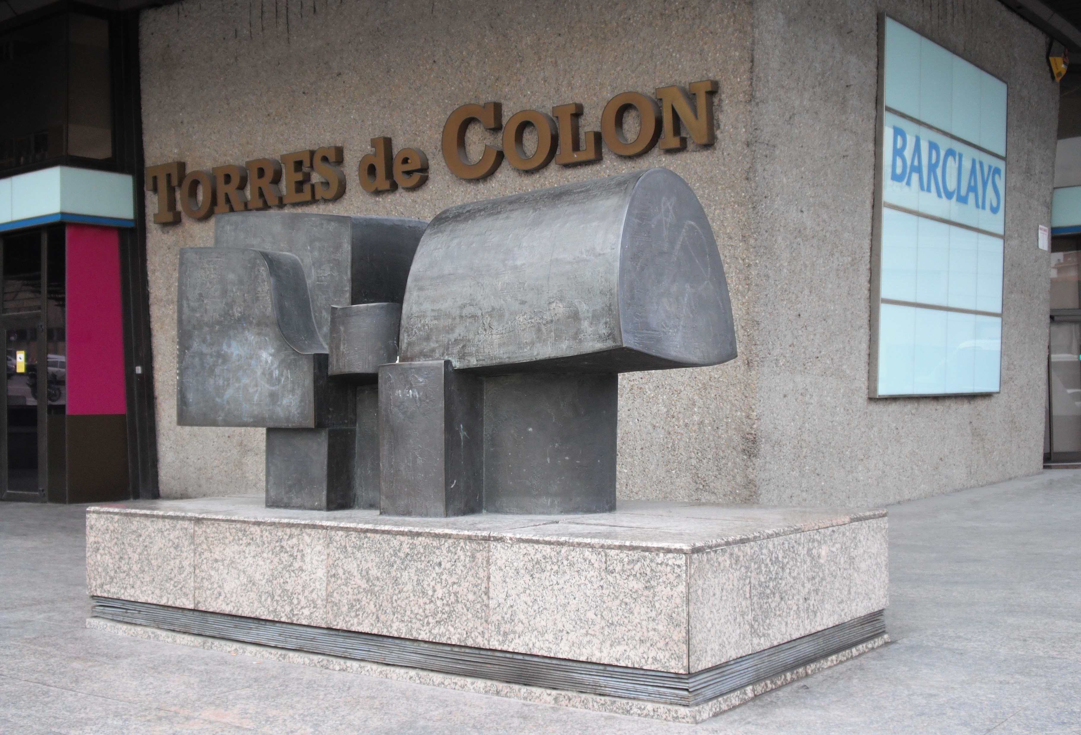 Herón escultura de José Luis Sánchez de 1975 junto a las Torres de Colón, Plaza de Colón, Madrid, España